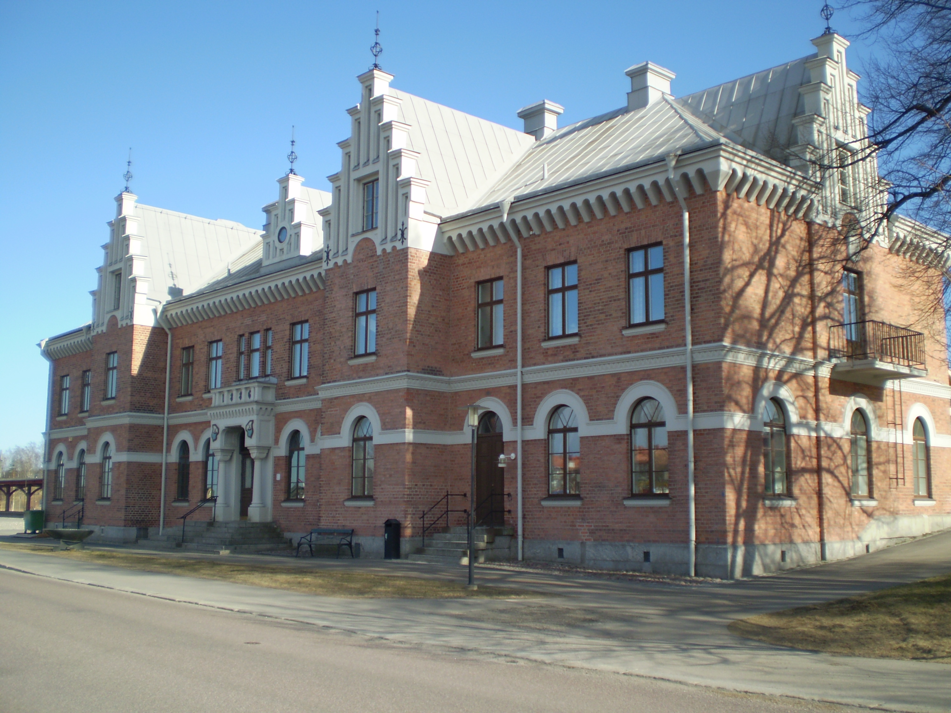 Järnvägsstationen i Söderhamn vid Södra Hamngatan 50.